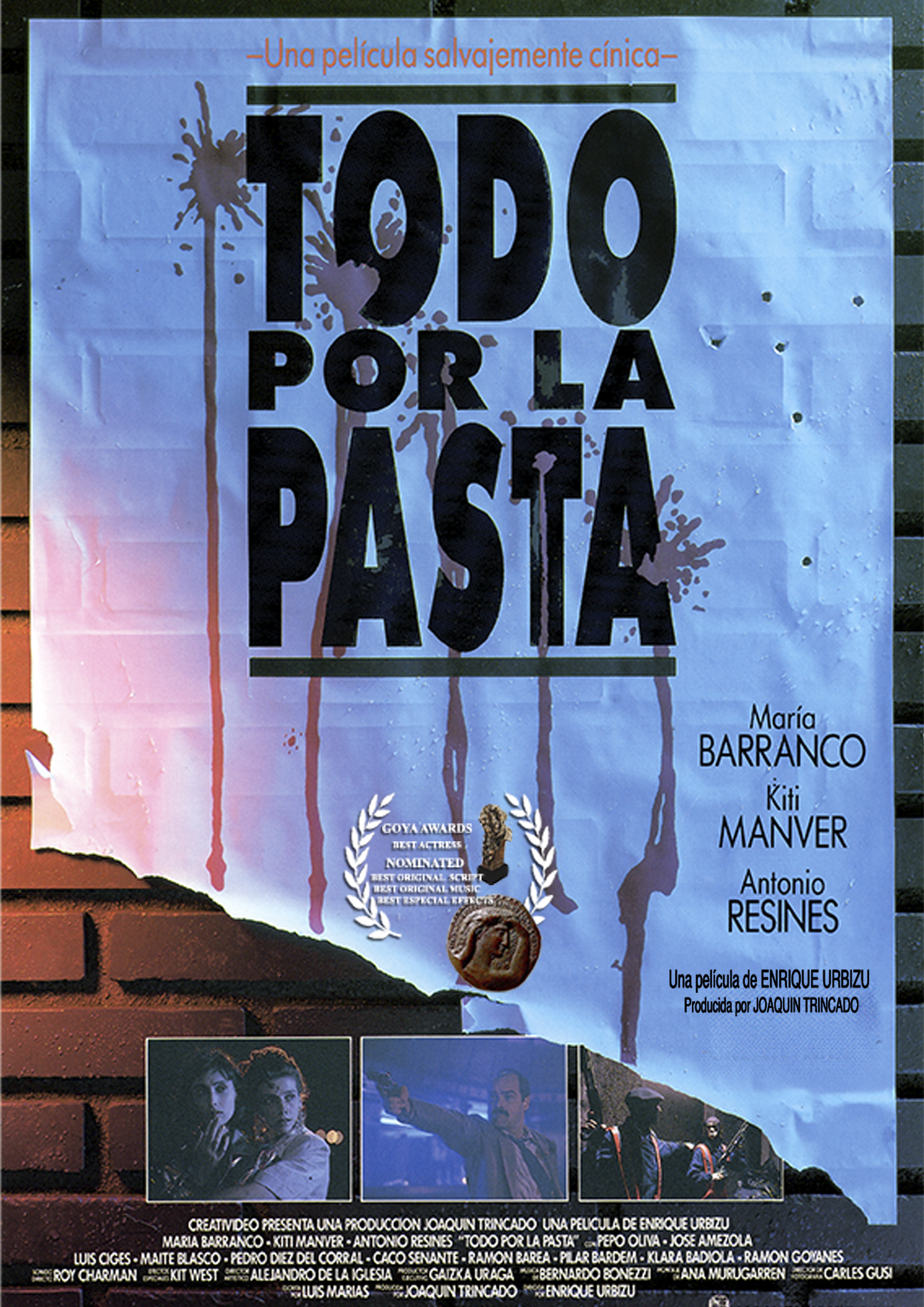 Cartel Todo por la pasta